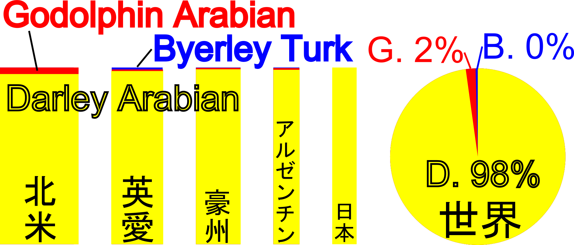 三大始祖の勢力図（2016年生産頭数ベース。世界21ヶ国合計）